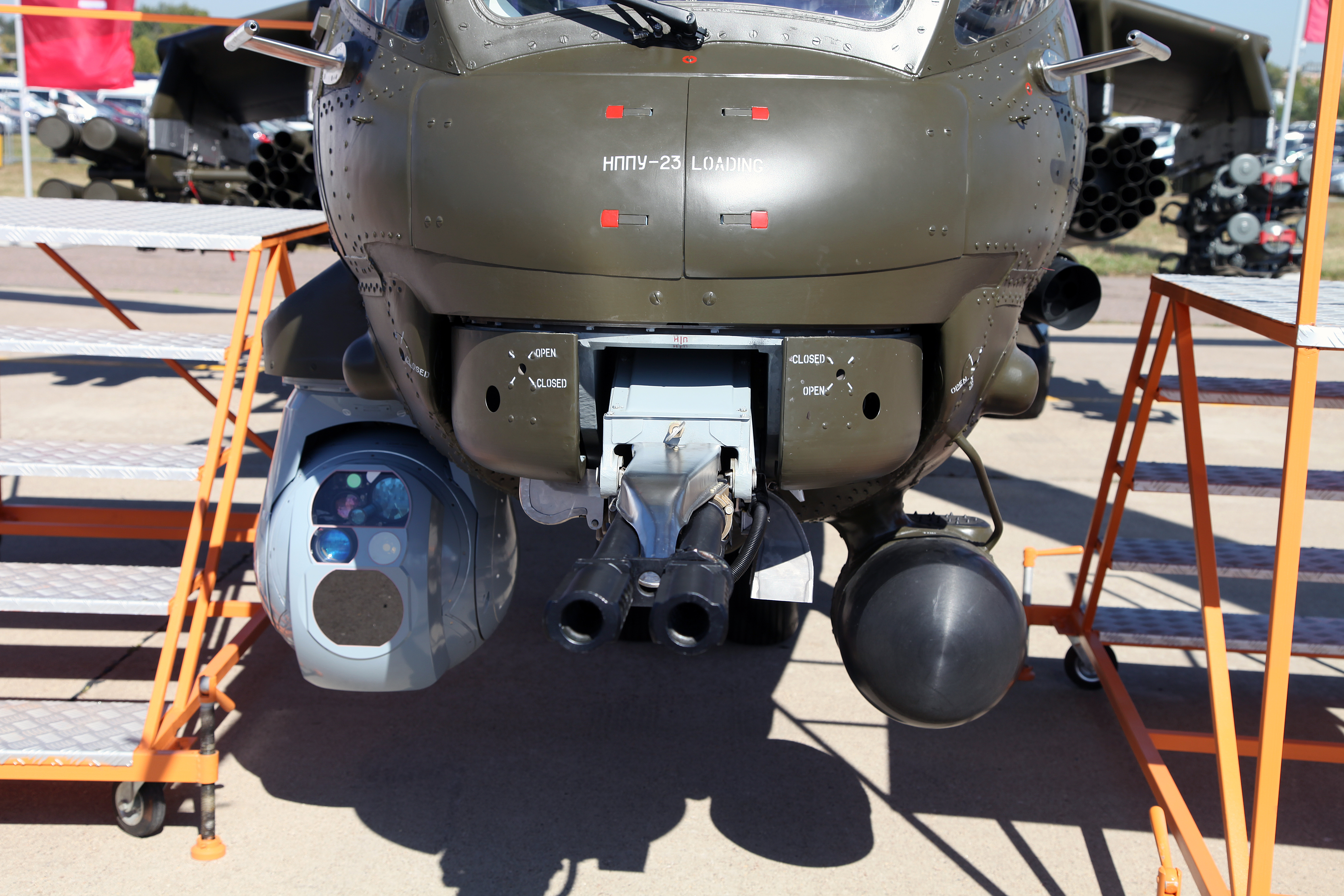 Ми-35М (Mi-35M)